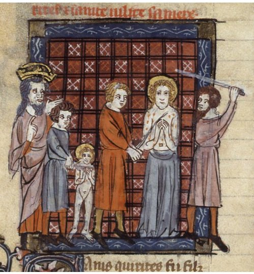 Martyre de saint Cyrice et de sainte Julitte. Cote : Français 185 , Fol. 233v. Vies de saints, France, Paris, XIVe siècle, Richard de Montbaston et collaborateurs.